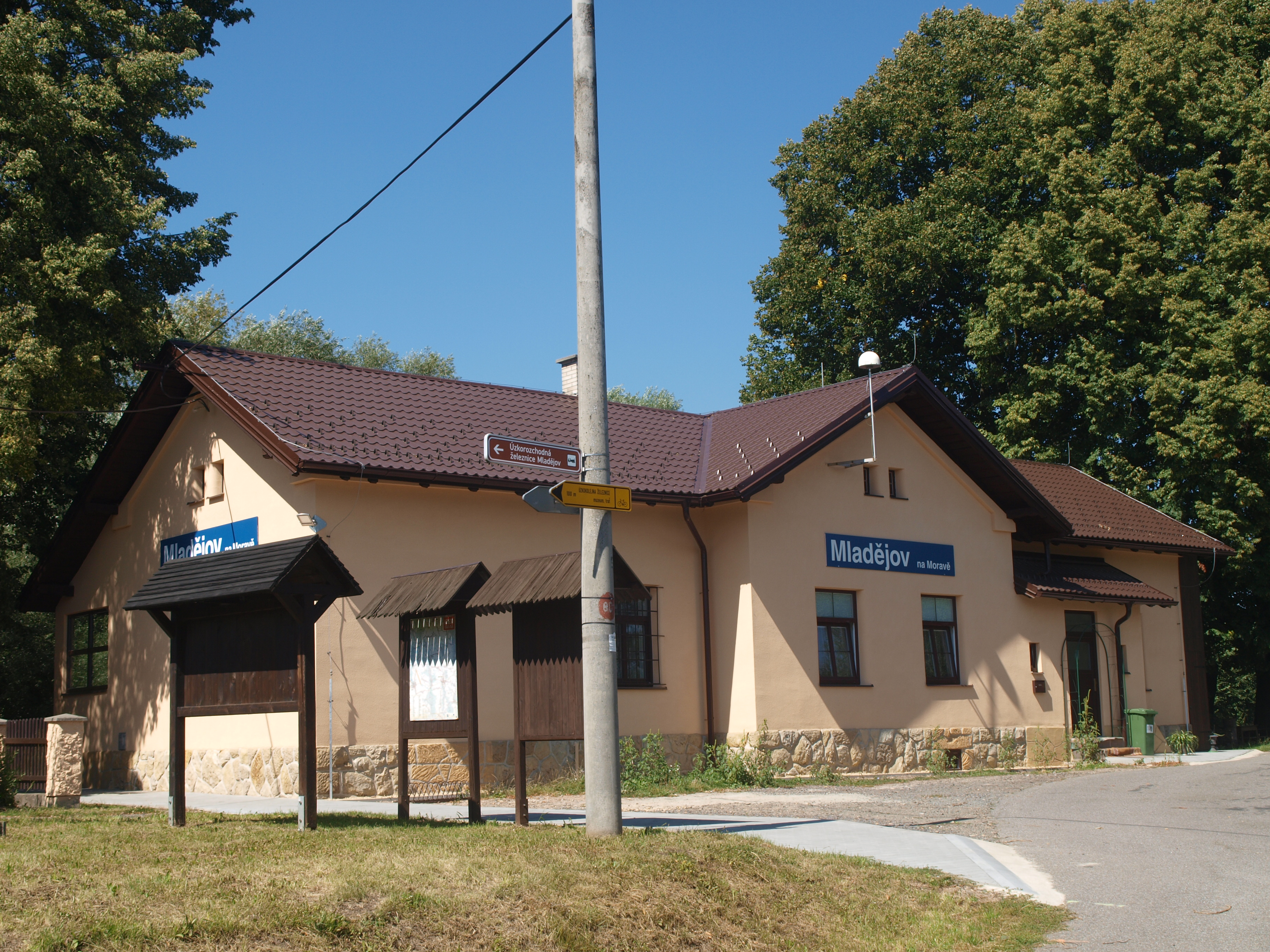 nádraží v Madějově na Moravě